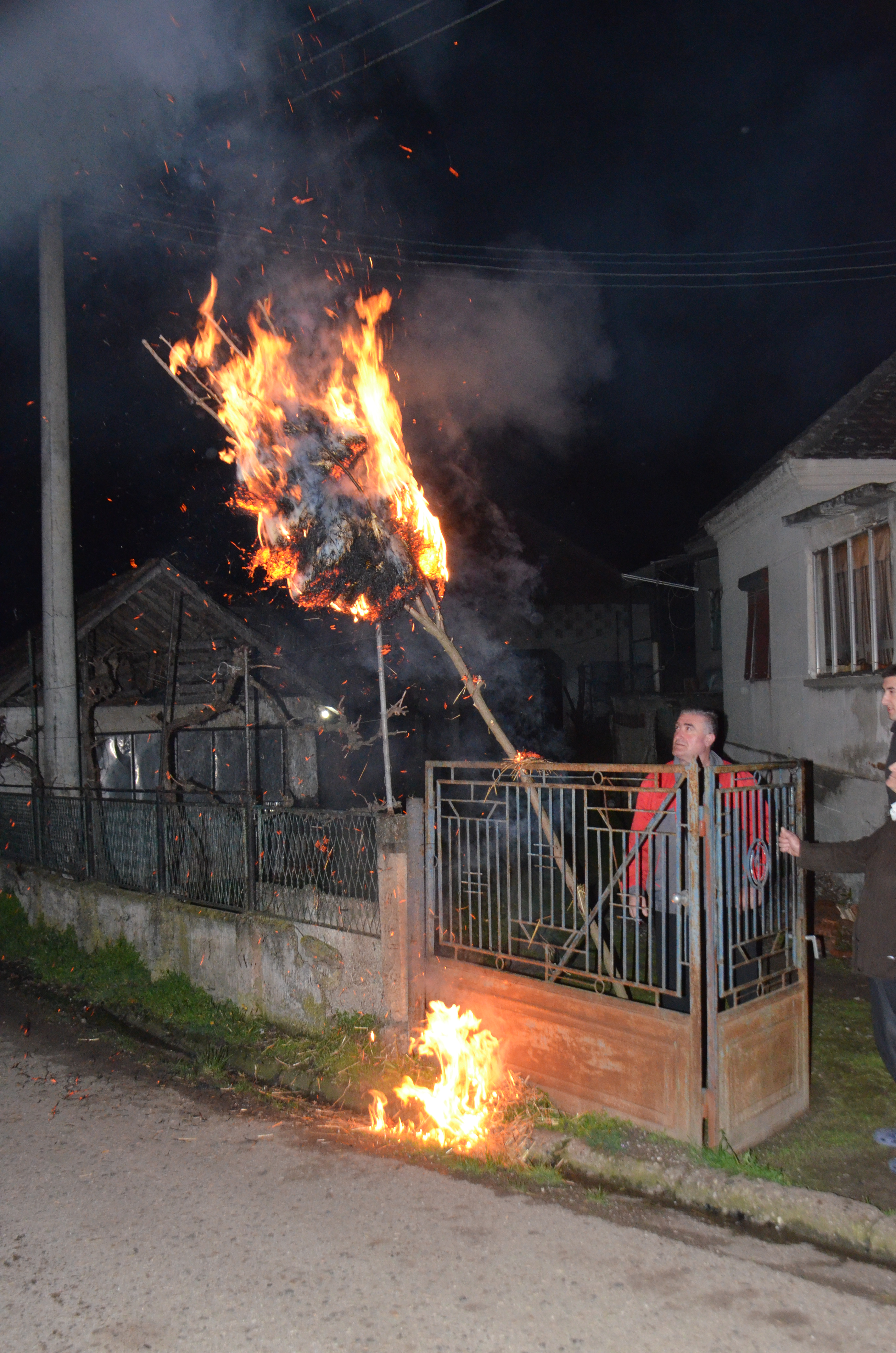 Српски (ћирилица): Паљење палалија на Беле покладе